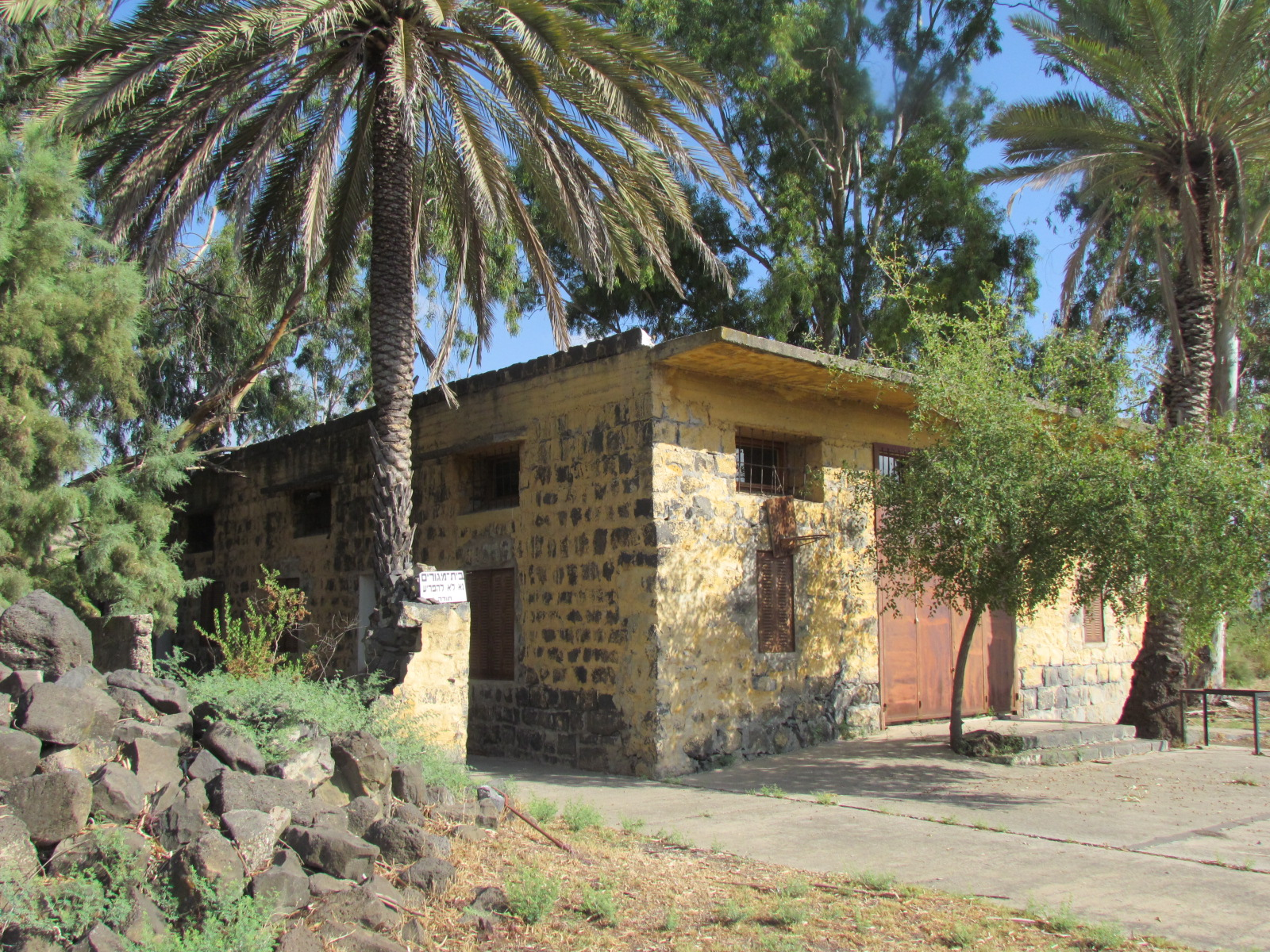 קבוצה של 16 משפחות איכרים יהודיים מחצי האי קרים שבאוקראינה התיישבה במקום כאריסיו של עבדול רחמן פאשה אל יוסוף, בעל אדמות בטיחה